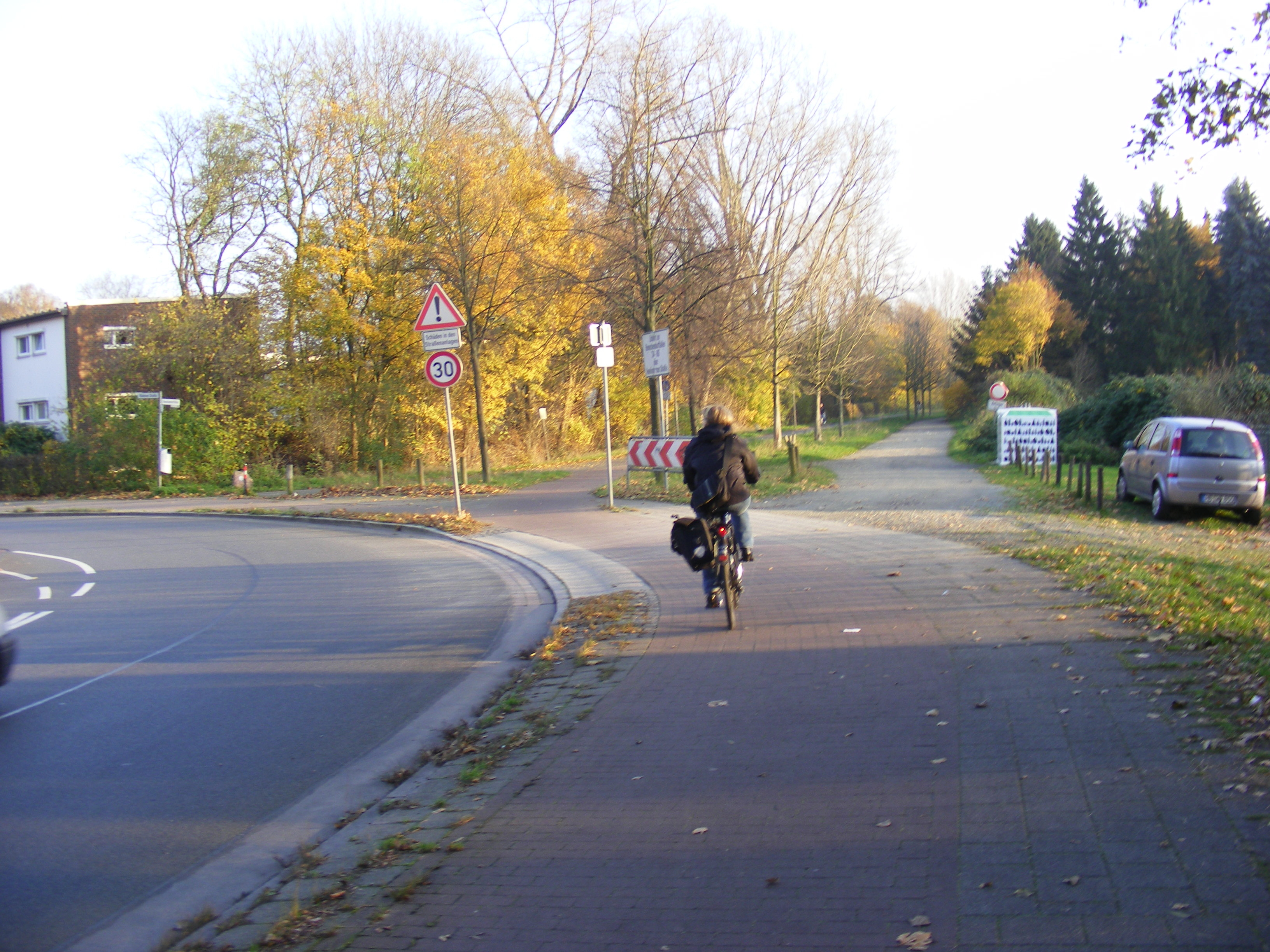 Bremen: An der Müdener Straße biegt der Autoverkehr in die Gartenstadt Vahr ab. Hier beginnt der bis auf etwas Kleingartenzuwegung autofreie Teil der Beneckendorfallee, eine wichtige Veloroute